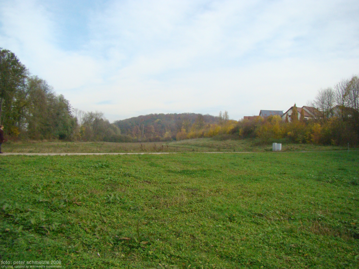 Ehemaliges Areal des KZ Kochendorf. Der Weg trennt den Standort der Verwaltungsgebäude (Vordergrund) vom Standort der Häftlingsbaracken (Hintergrund). Rechts neue Gebäude des Friedrichshaller Stadtteils Plattenwald.